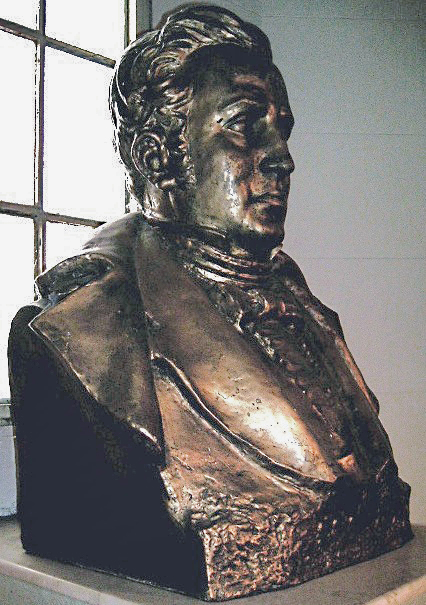 Imagen de perfil del Busto del Dr. Mariano Moreno; escultura de Erminio Blotta (1892-1976); en la Estación Terminal de Ómnibus de Rosario, Argentina. Fotografía de Luis A. Blotta Stengel.